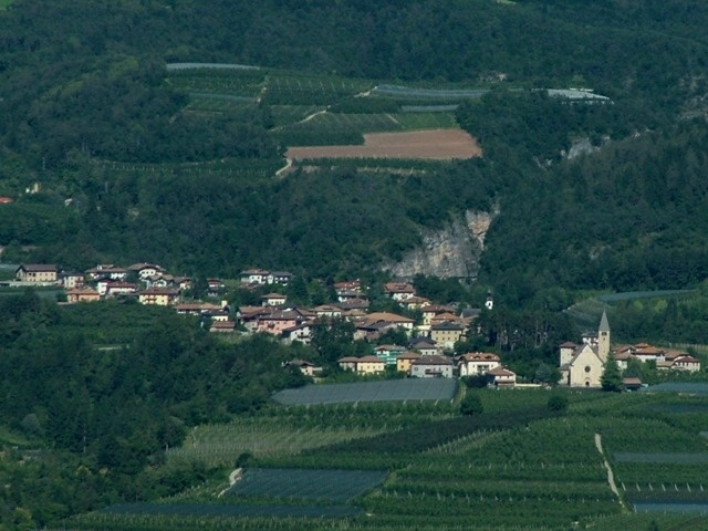 Panorama del paese di Sanzeno, fotografato da sud